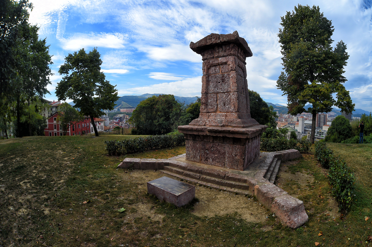 Monumento en recuerdo del sitio que padeció Bilbao por los carlistas